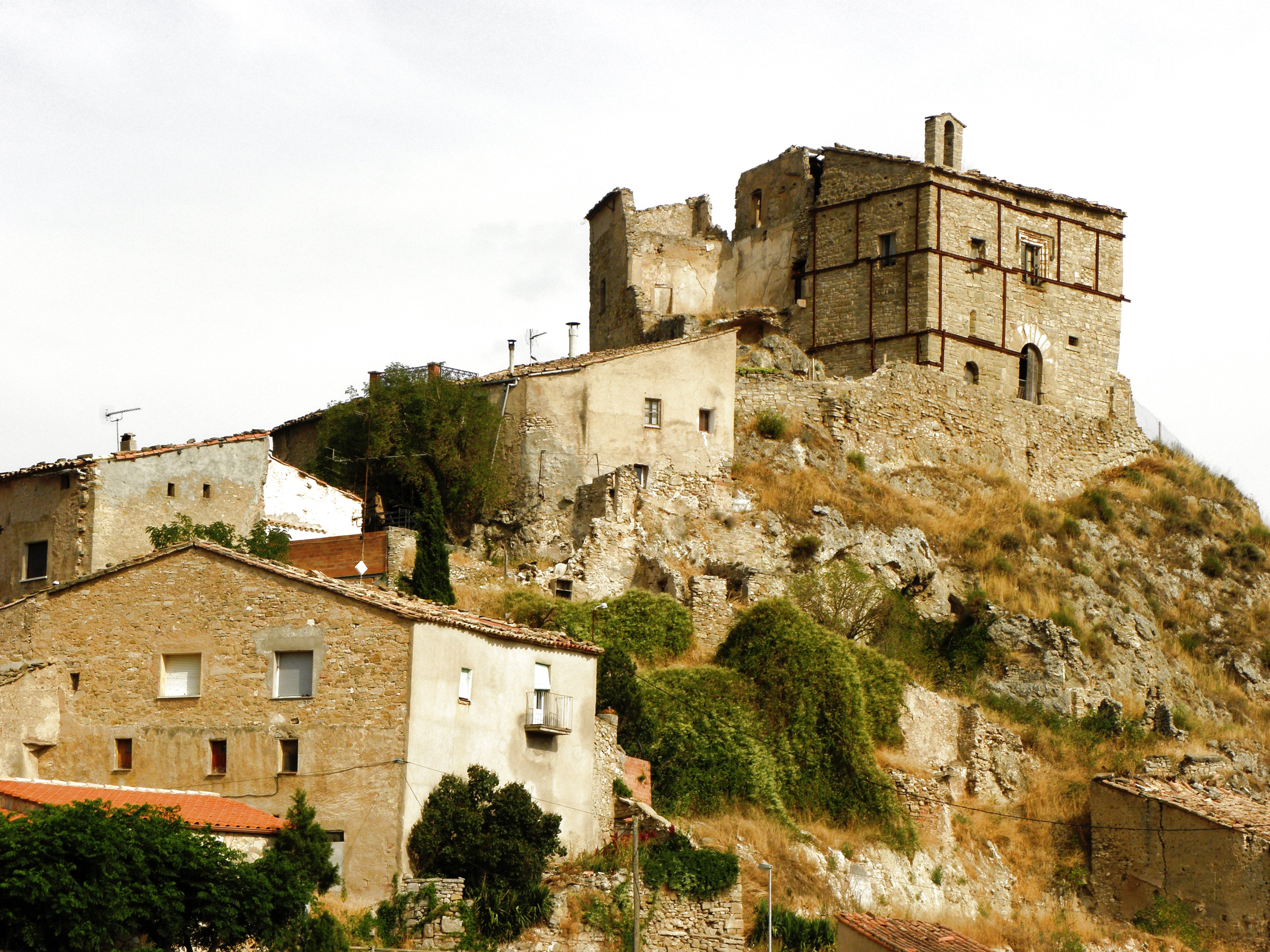 Enfesta (La Molsosa, Solsonès). Castell i part del poble